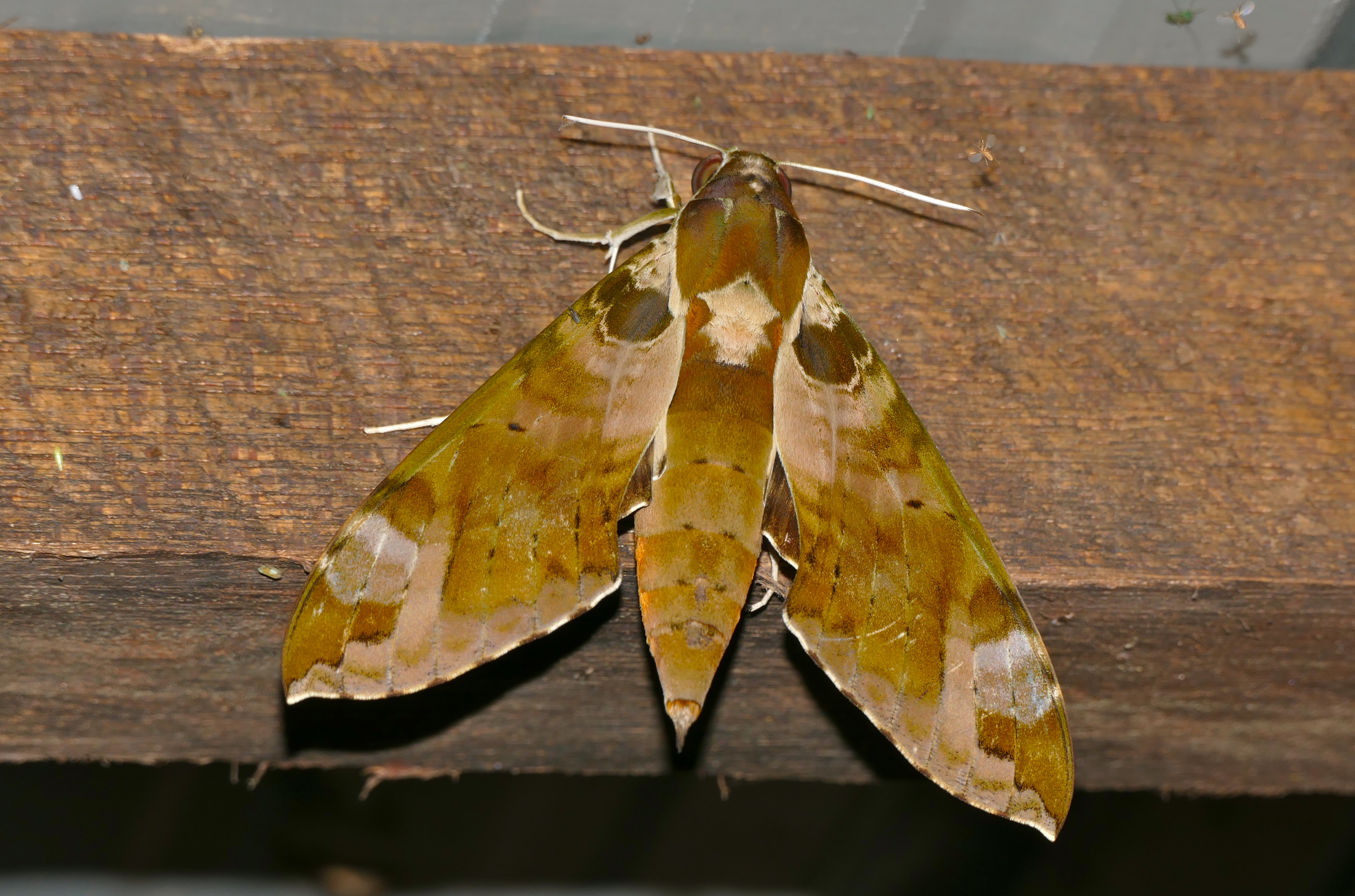 Mulu NP, Sarawak, MALAYSIA